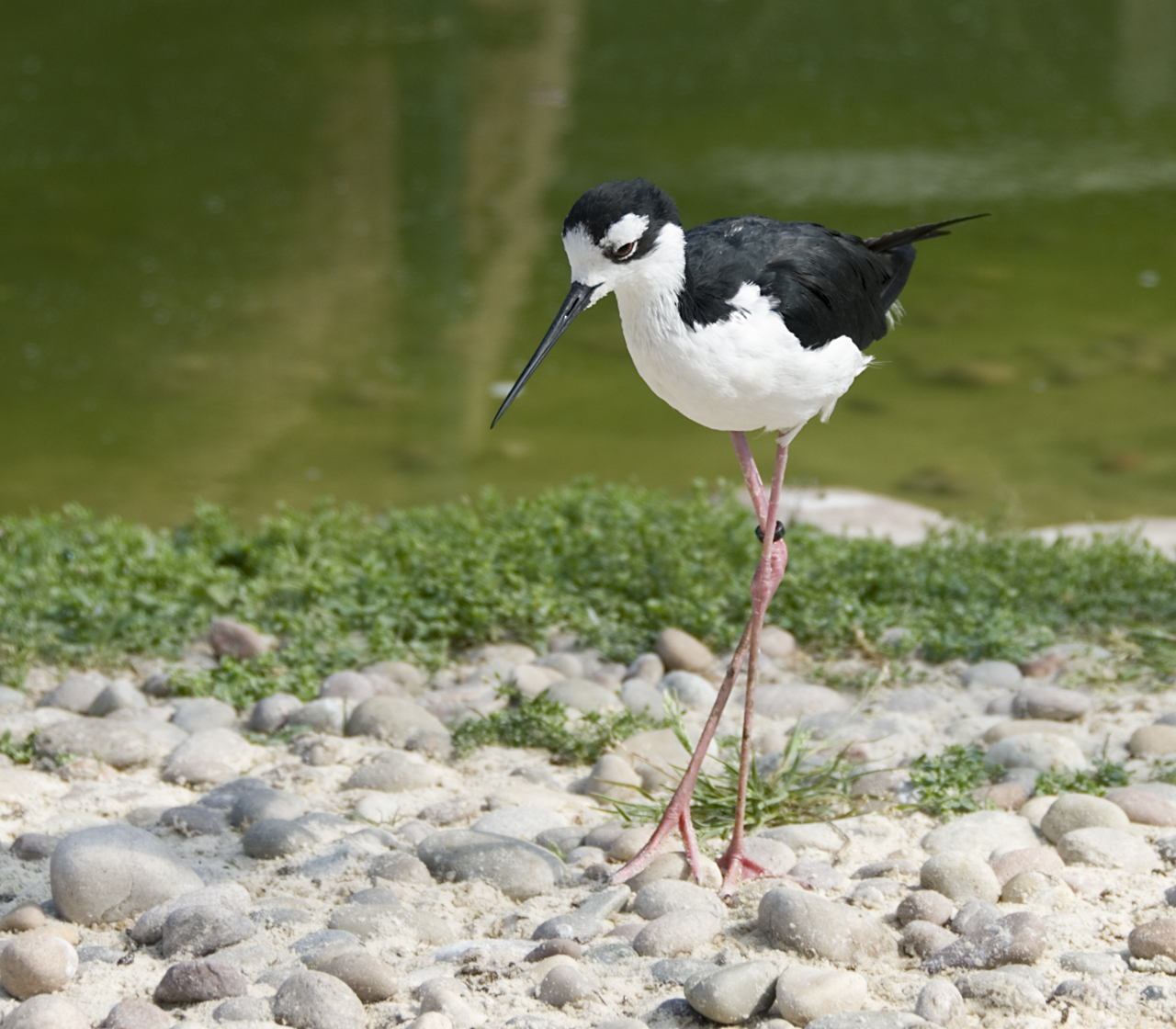 Himantopus mexicanus